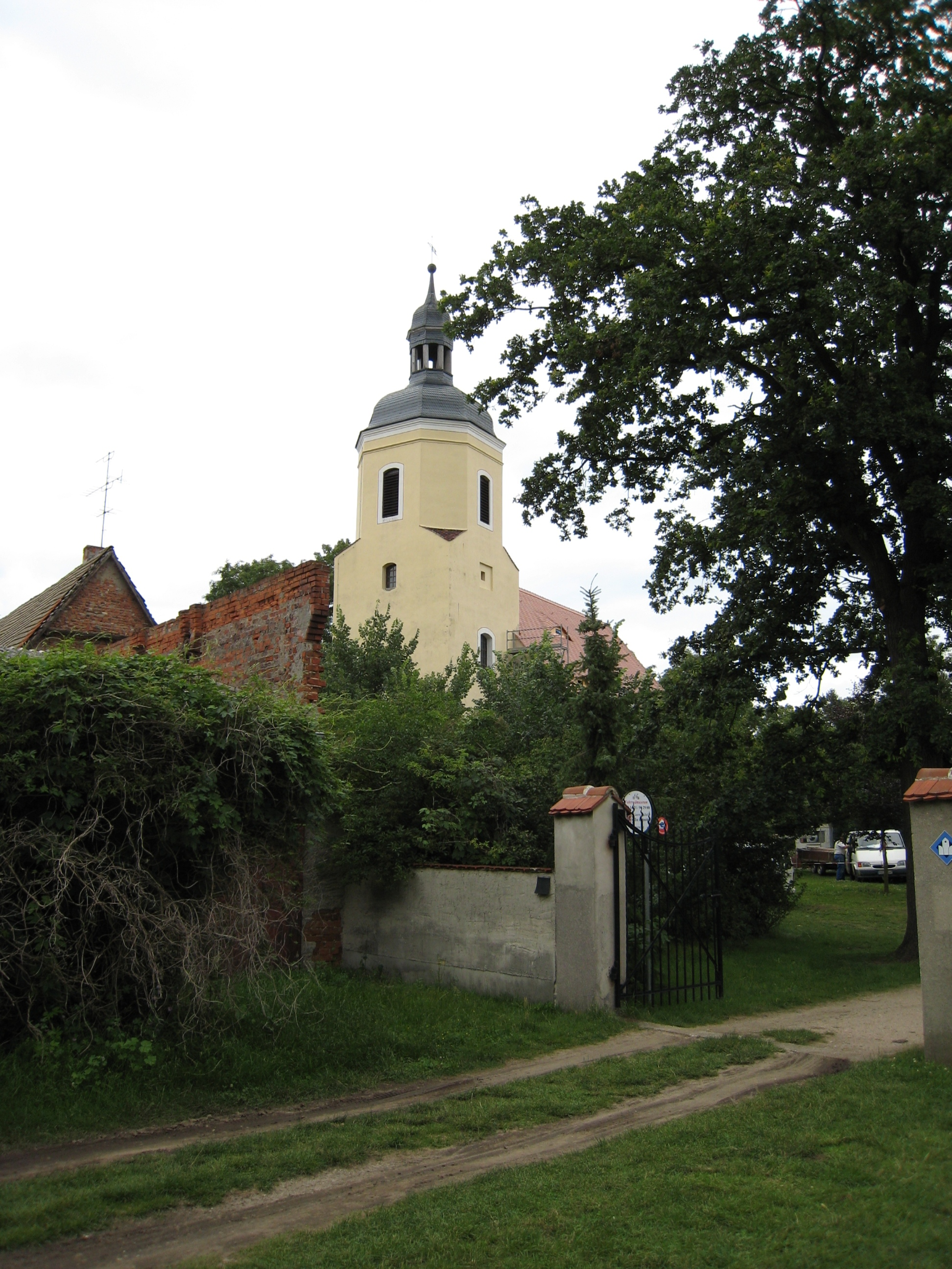 Radfahrerkirche Weßnig am Elberadweg bei Torgau